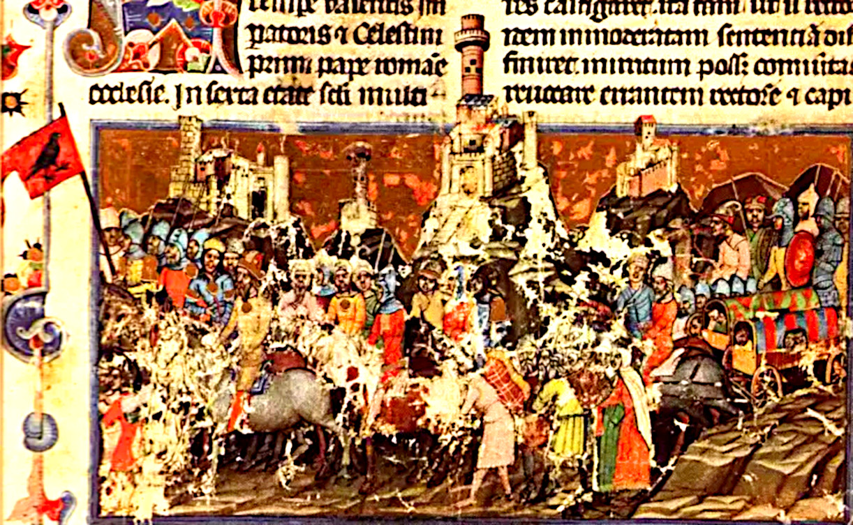 A magyarok bejövetele a Képes krónika illusztrációja